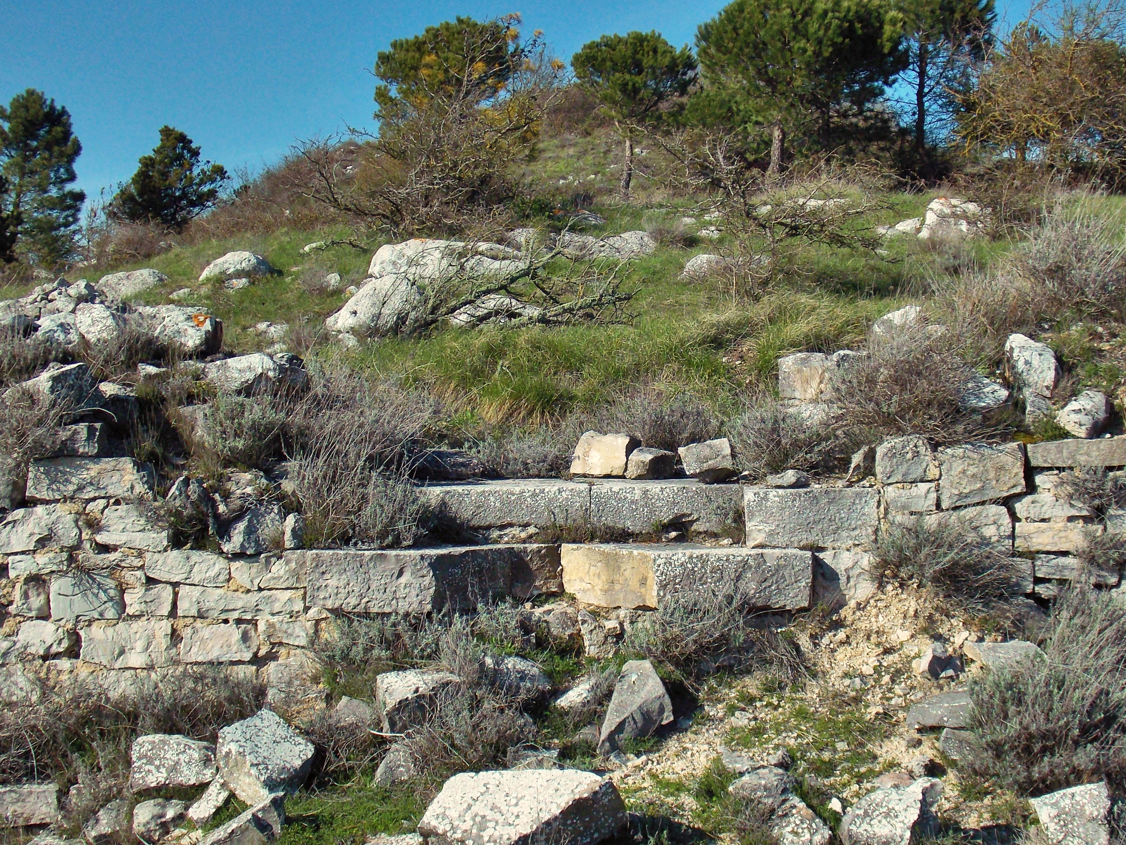 L'area archeologica di Monte Chiodo a Buonalbergo, in provincia di Benevento: accesso alla chiesa da nord